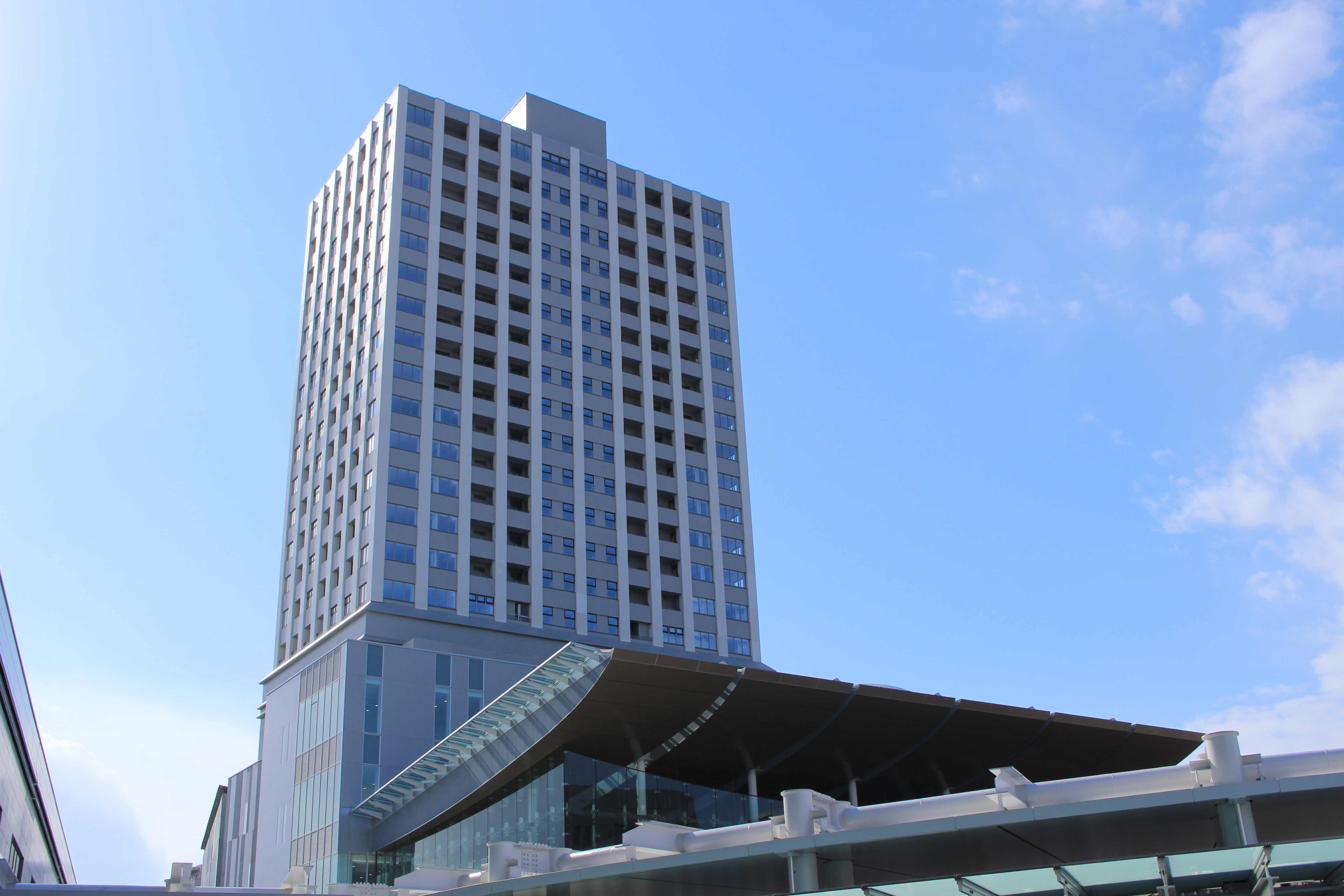 福井駅前に建設中の複合ビルハピリン